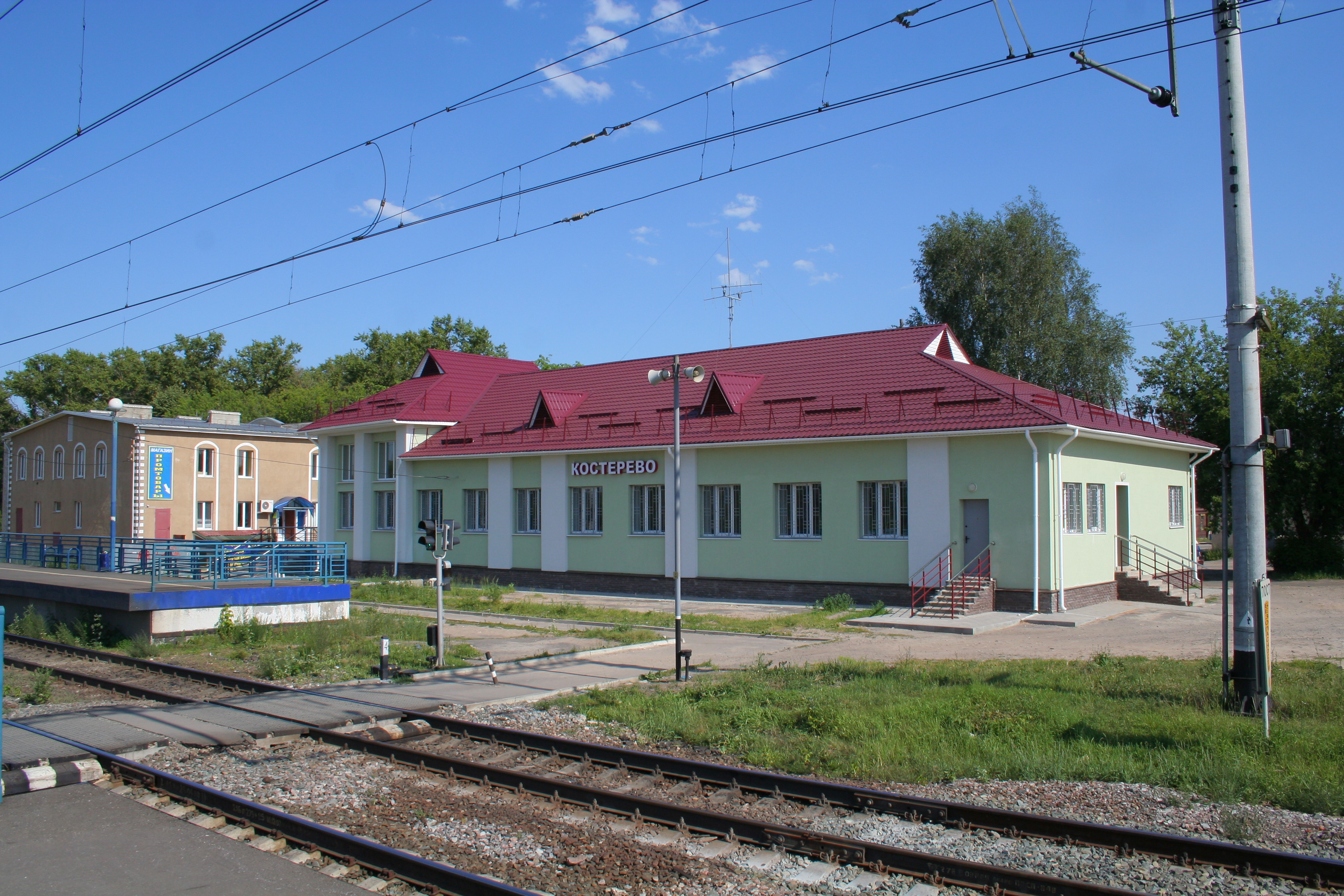 Bahnhof mit Empfangsgebäude in Kosterjowo, Oblast Wladimir, Russland.